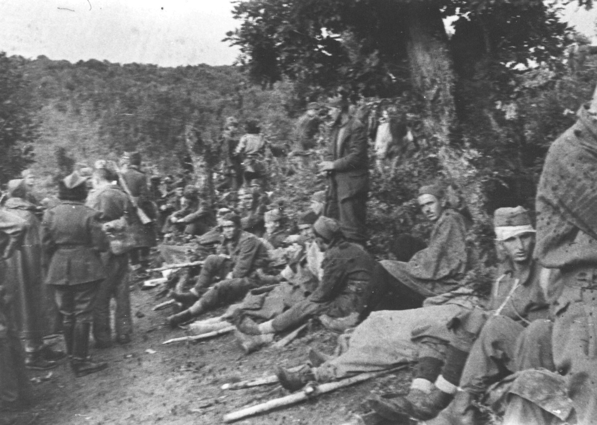 Srpskohrvatski / српскохрватски: Operativna grupa divizija NOVJ na putu za Srbiju forsira Ibar, nakon žestokih borbi sa Nemcima. 4. avgust 1944.